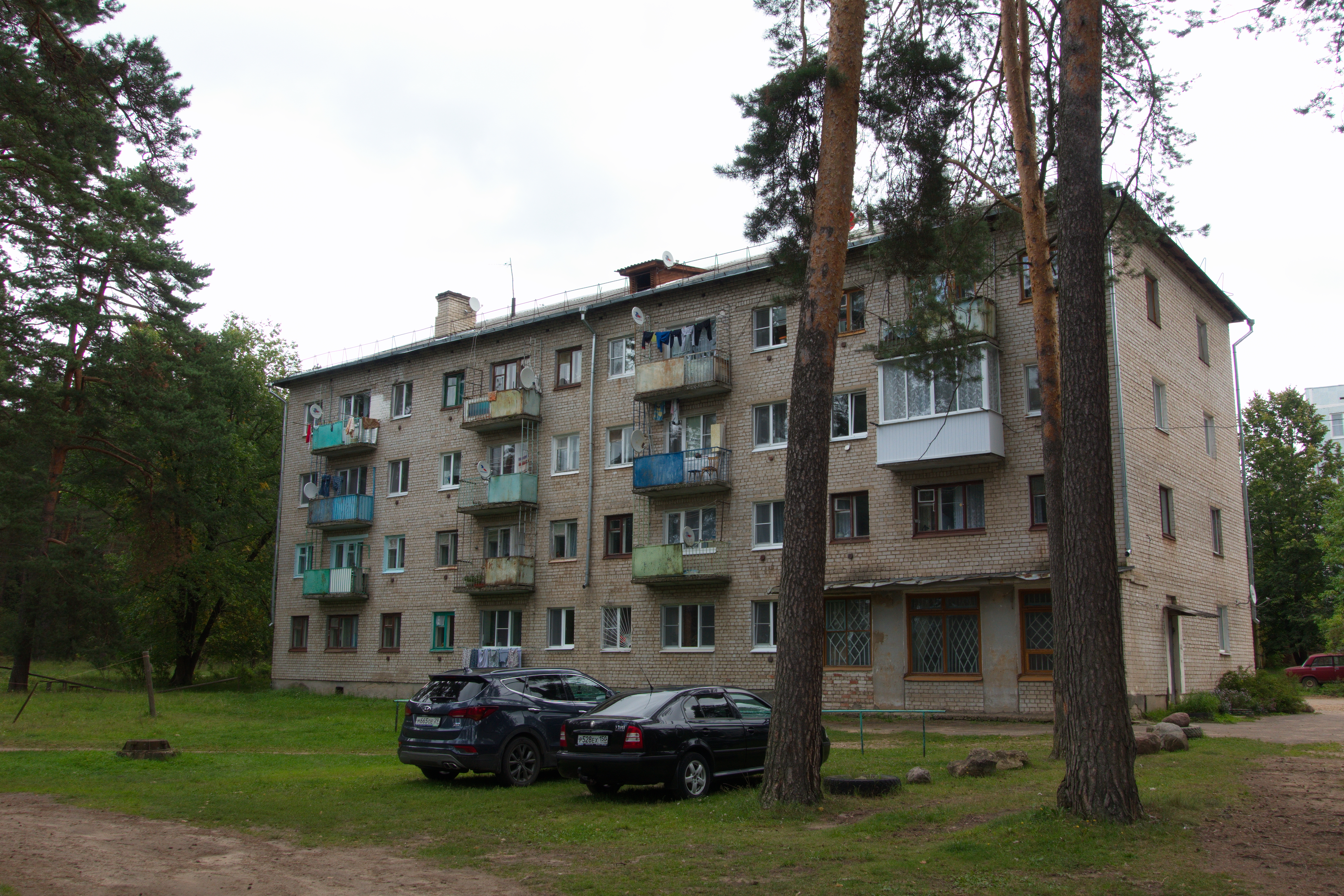 Посёлок Зелёный, Торжокский район Тверской области. Жилой дом №17